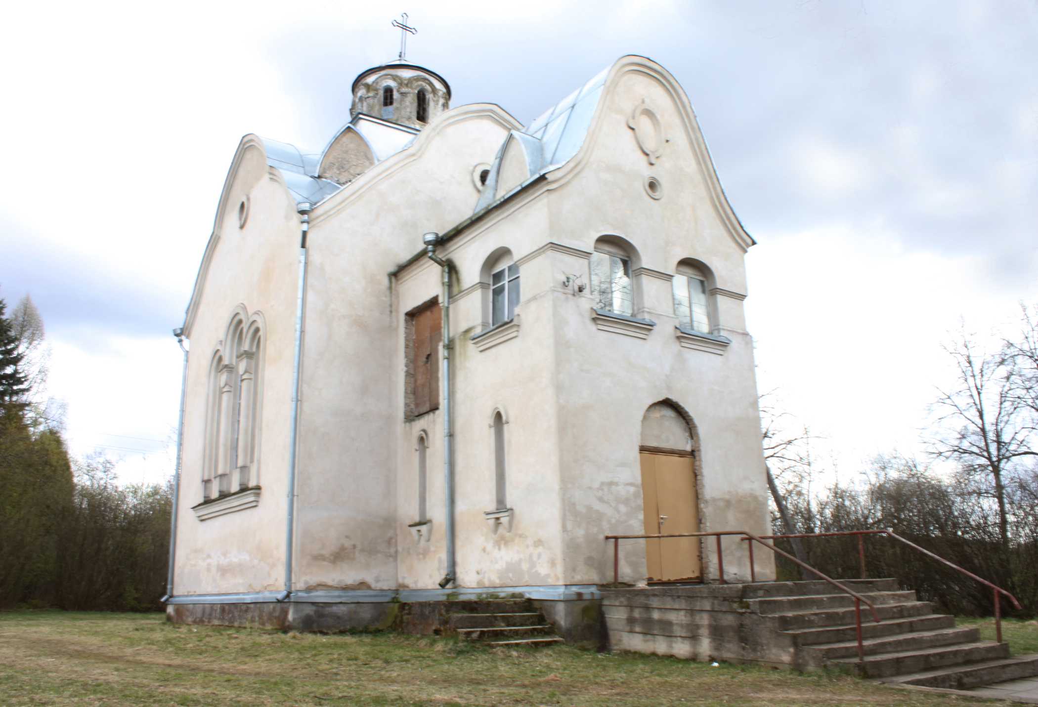 Mūsų Viešpaties Jėzaus Kristaus, Gerojo Ganytojo koplyčia